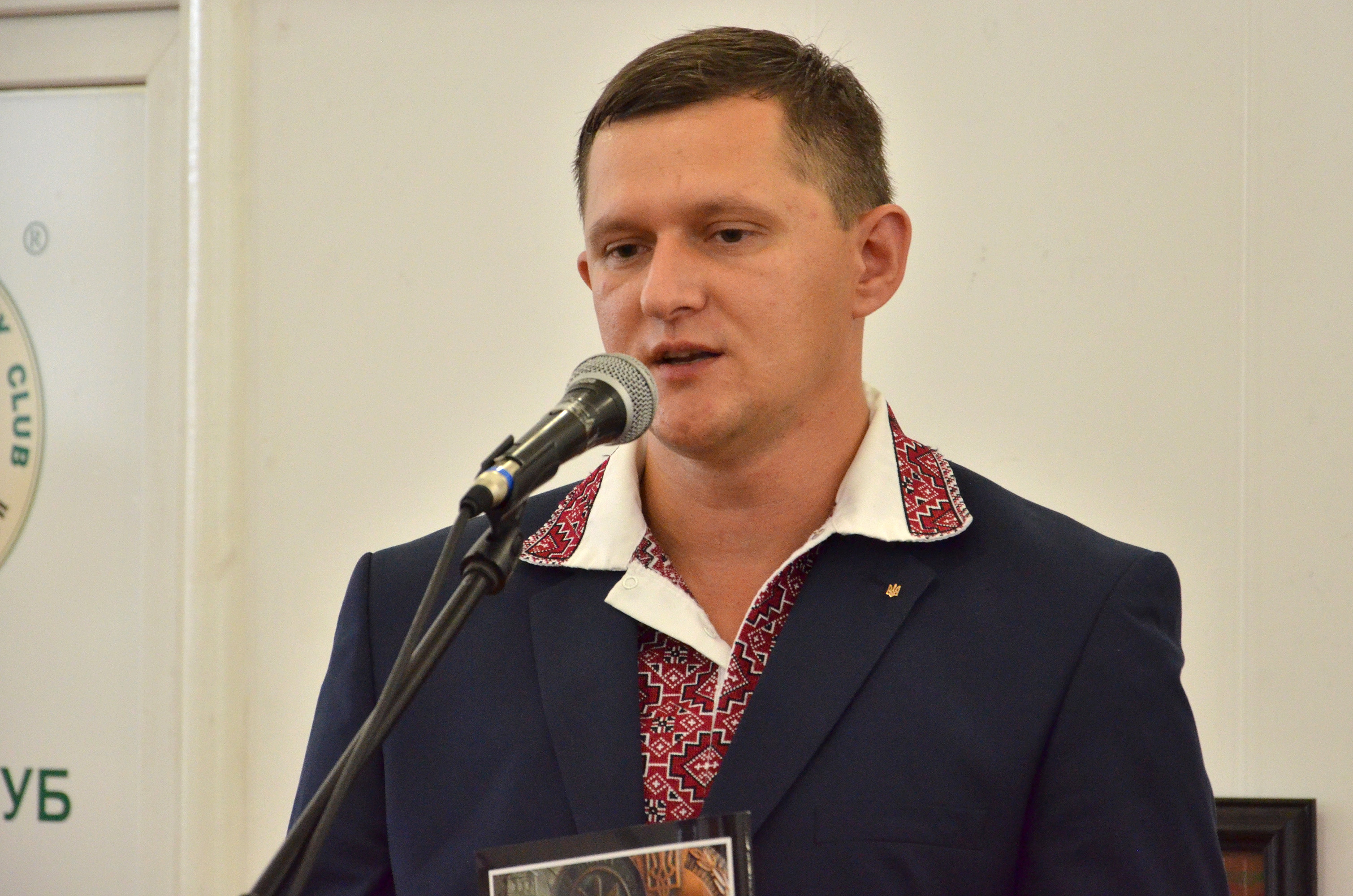 Український маркетолог, громадсько-політичний діяч. Депутат Тернопільської обласної ради Михайло Тимошик презентує каталог «Медалі Тернопільщини».